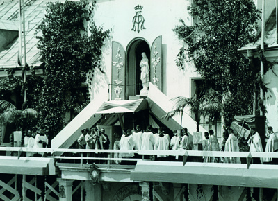 Коронація статуї Матері Божої Язловецької